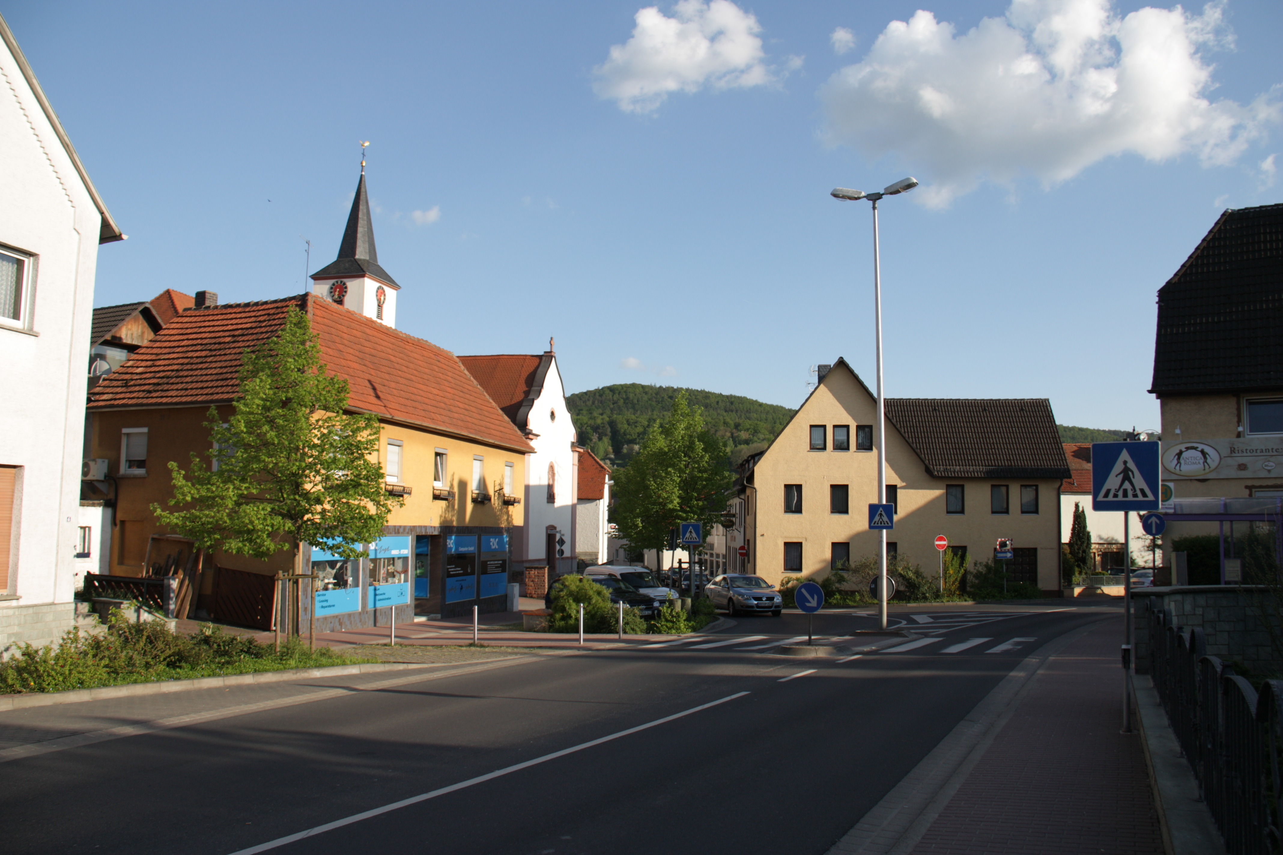 Der Lindenplatz im Alzenauer Stadtteil Michelbach, links die Michelbacher Pfarrkirche